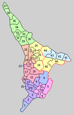 千葉県東葛飾郡の町村。